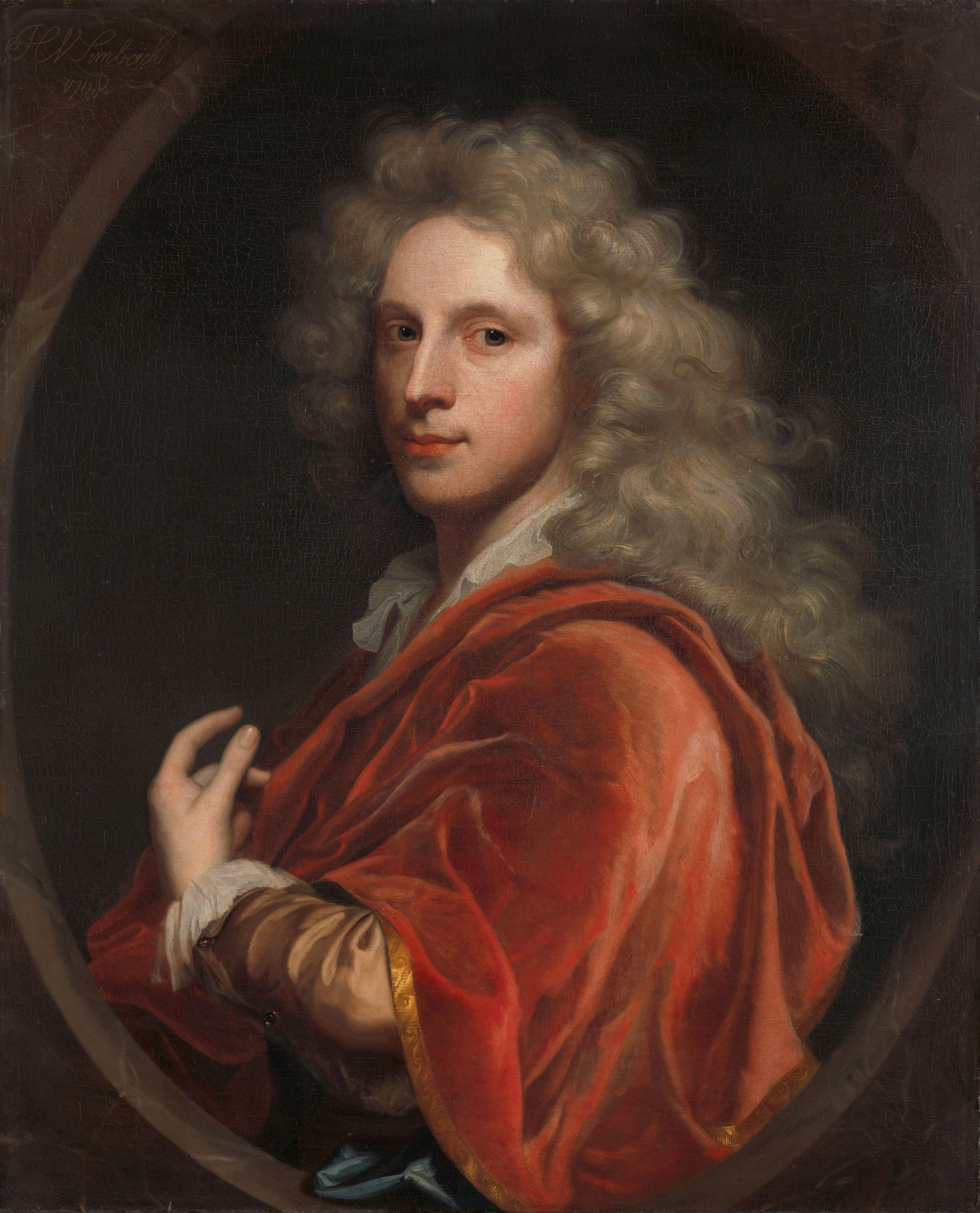 Zelfportret van de schilder Hendrik van Limborch. Ten halven lijve, ovaal, de linkerhand voor de borst.